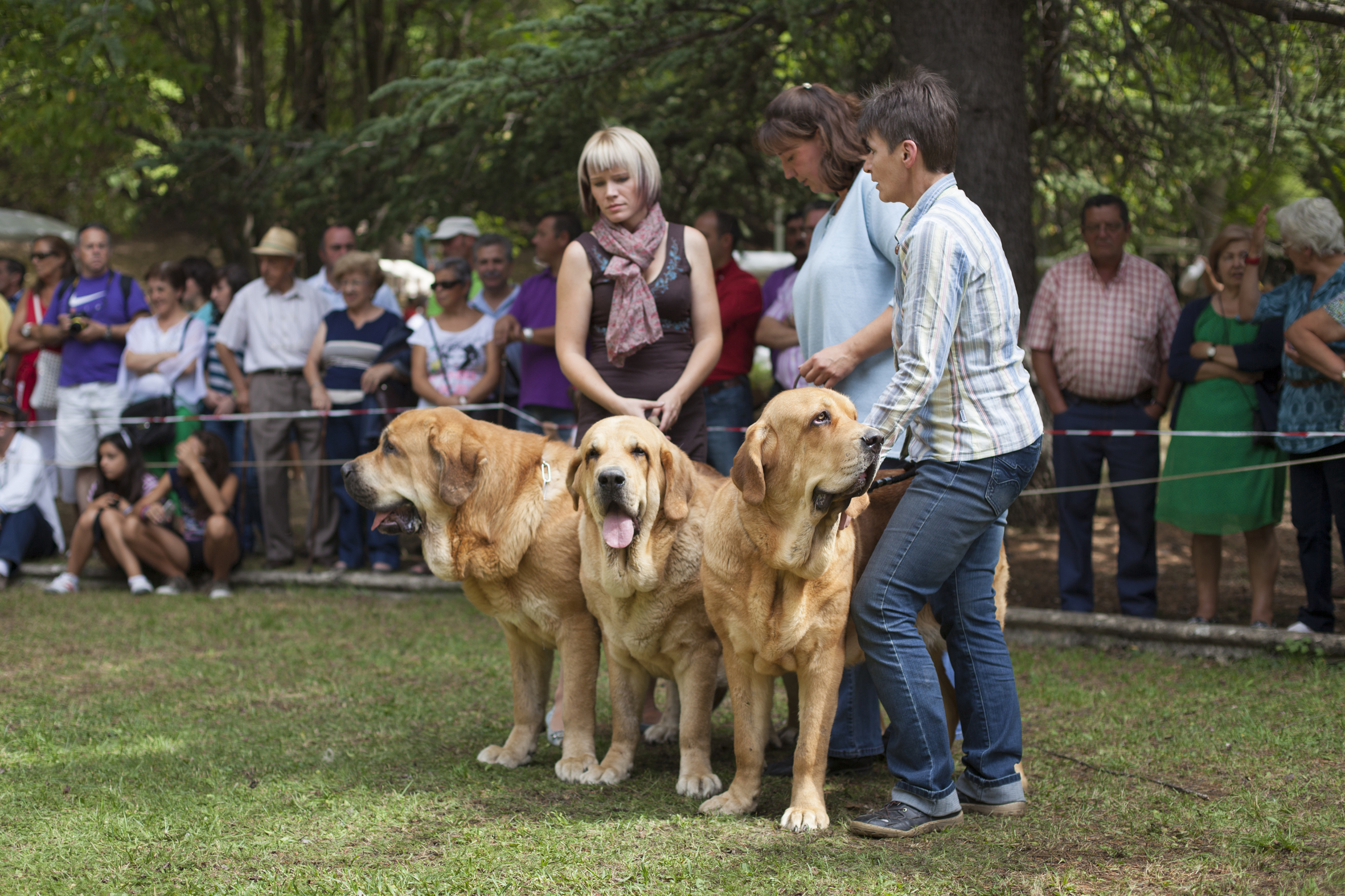 Fiesta del Pastor. Los Barrios de Luna, León, España. Septiembre de 2012. This is a photography of a Folklore festival in Spain (Wikidata id Q23660832).